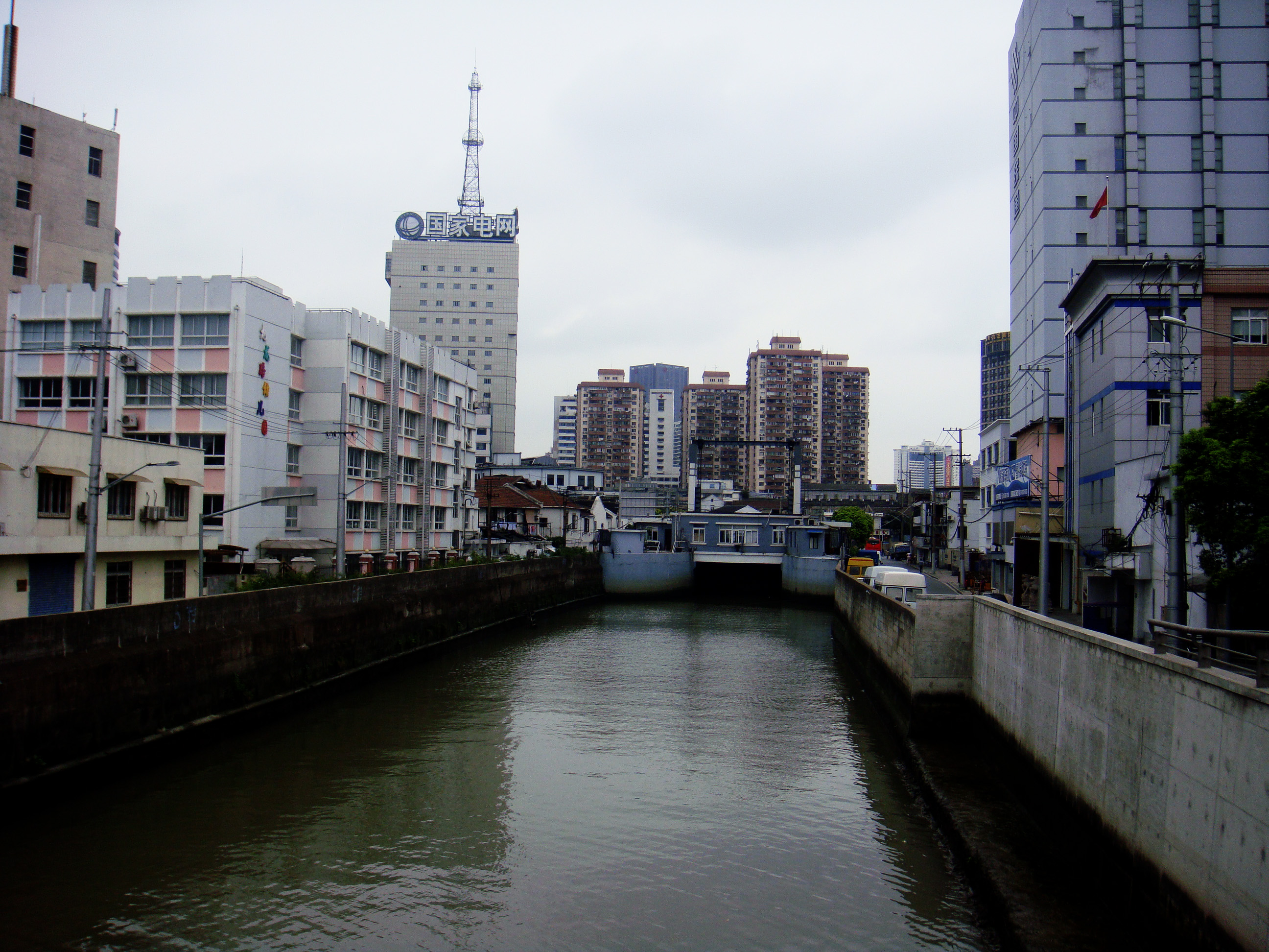 虹口港内侧